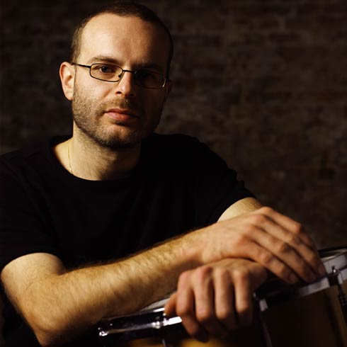 Fot. Tomasz Wierzbowski, zdjęcie pochodzi ze strony